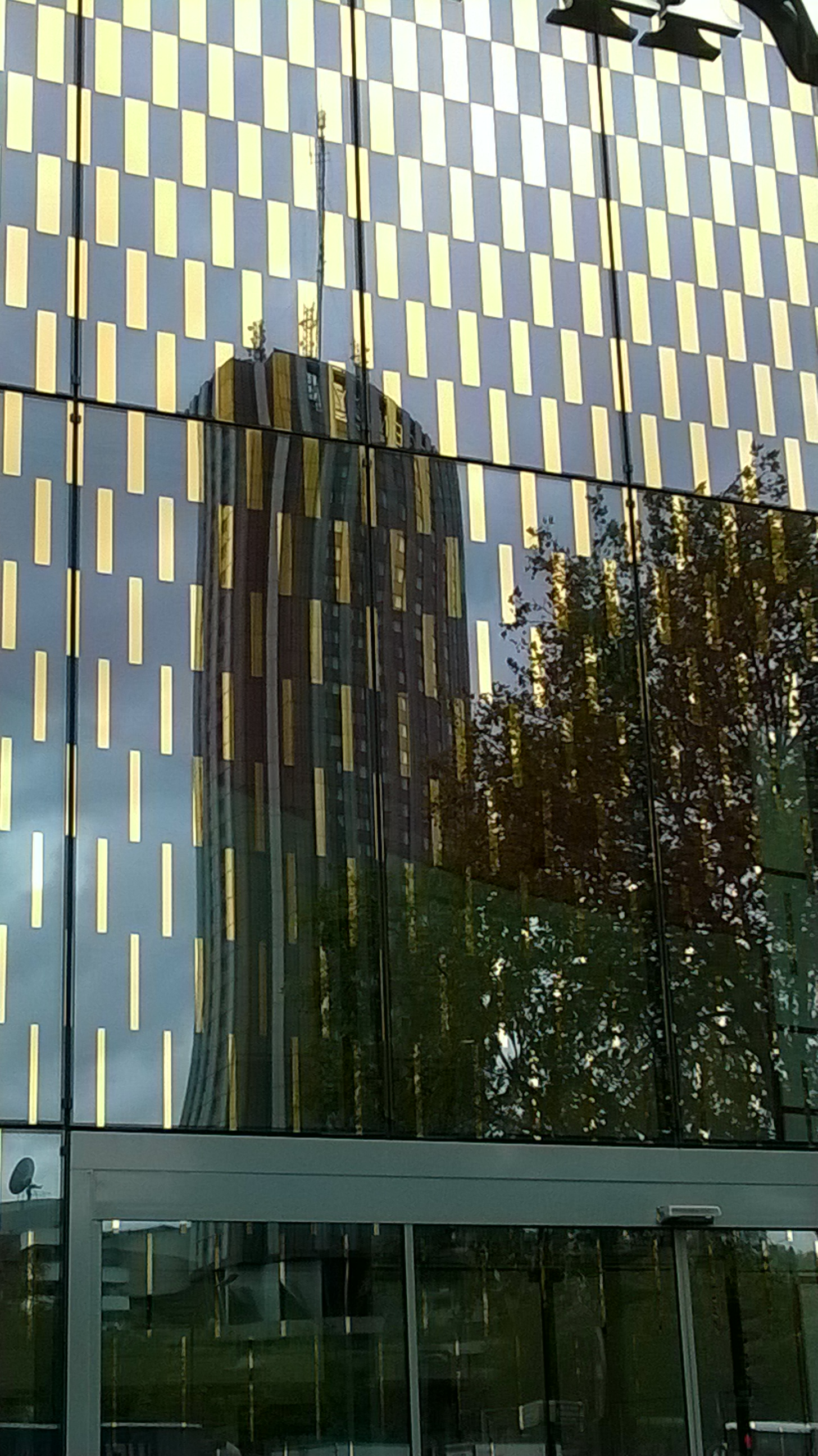 un reflet sur la tour concorde Lafayette porte Miallot